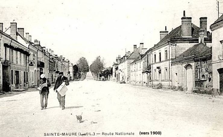 Centre-bourg de Sainte-Maure-de-Touraine, vers 1900.